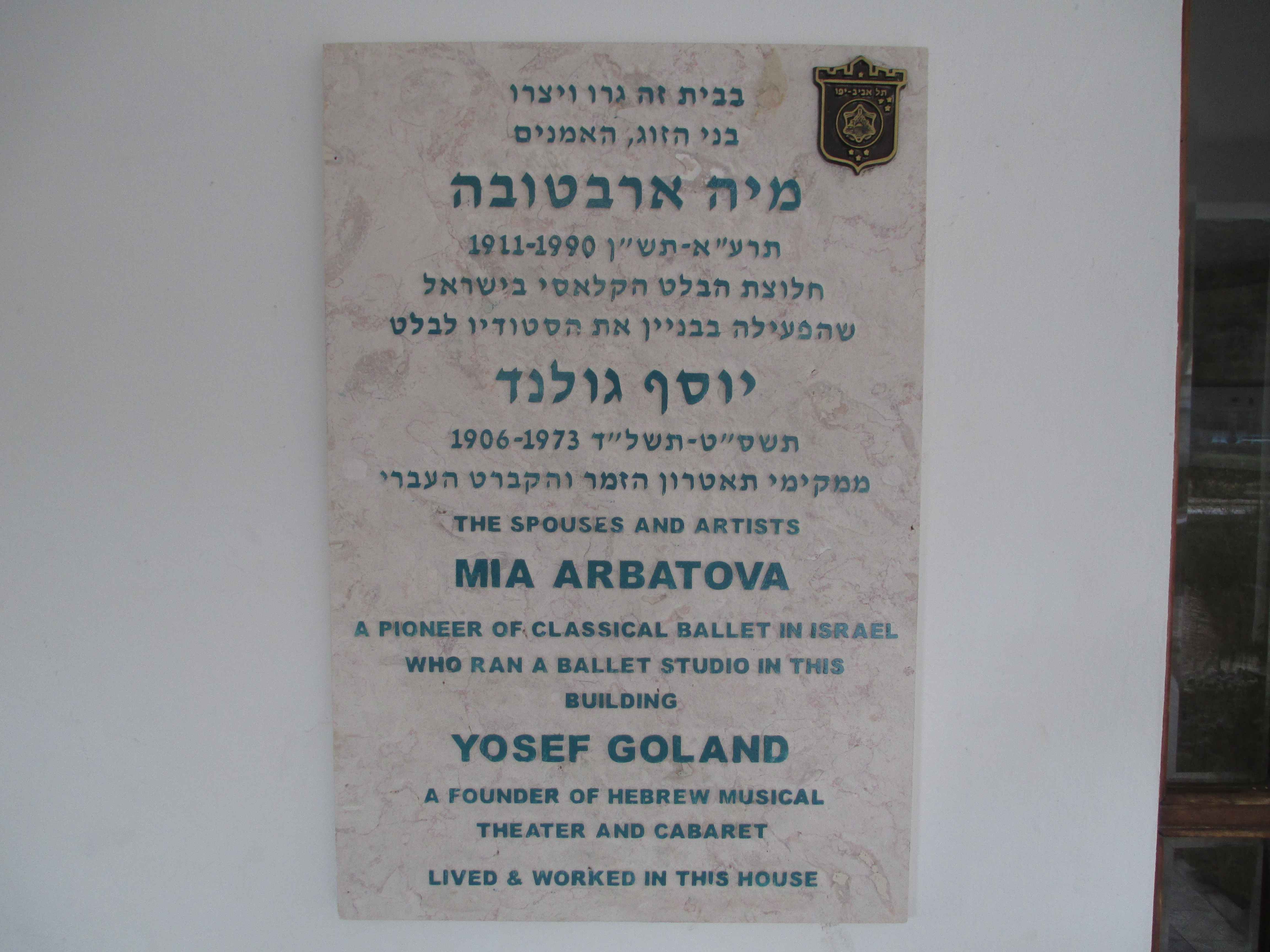 לוחית זיכרון למיה ארבטובה ויוסף גולנד על ביתם בשדרות בן גוריון 72 בתל אביב